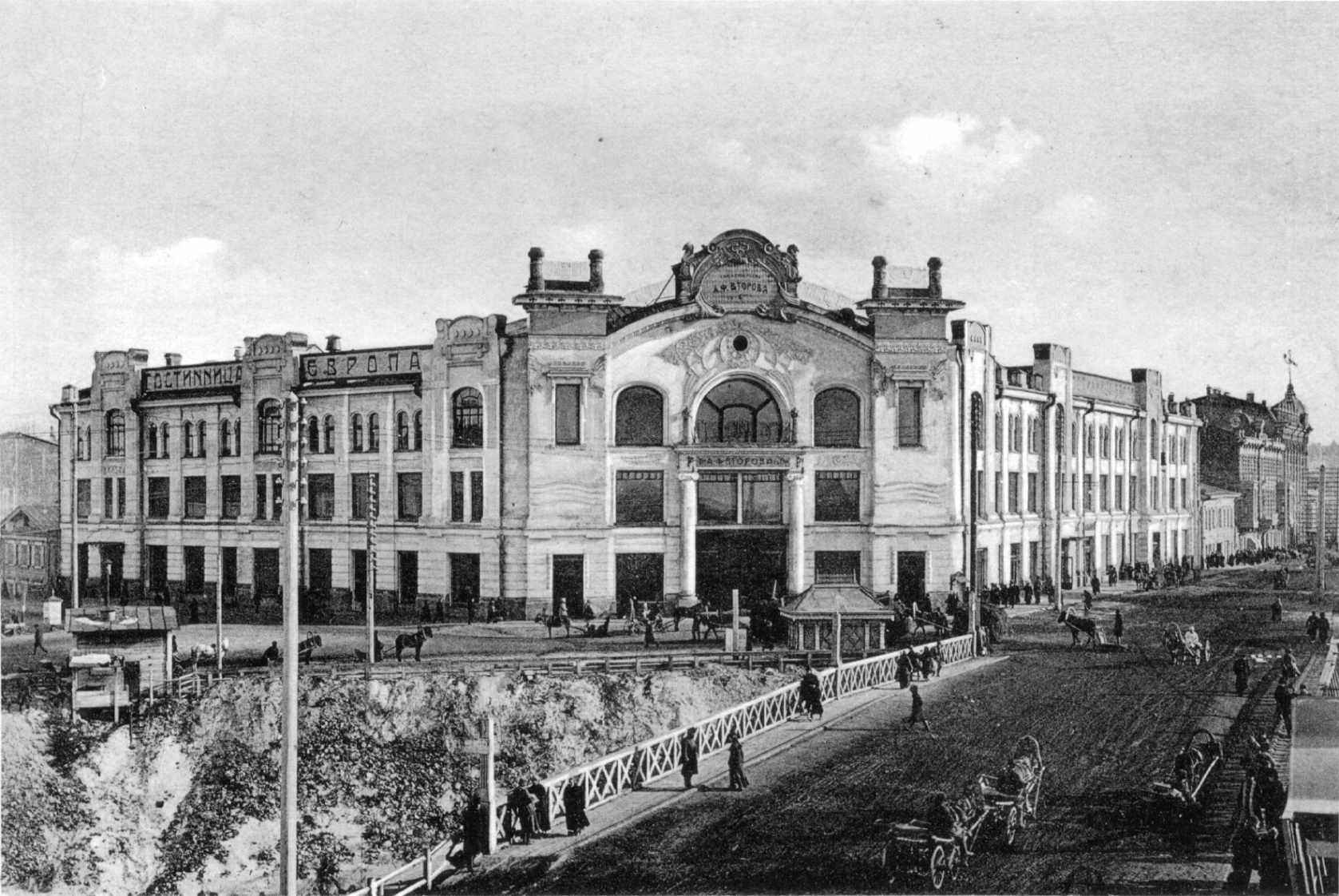 Томск. Базарный мост и Второвский пассаж.